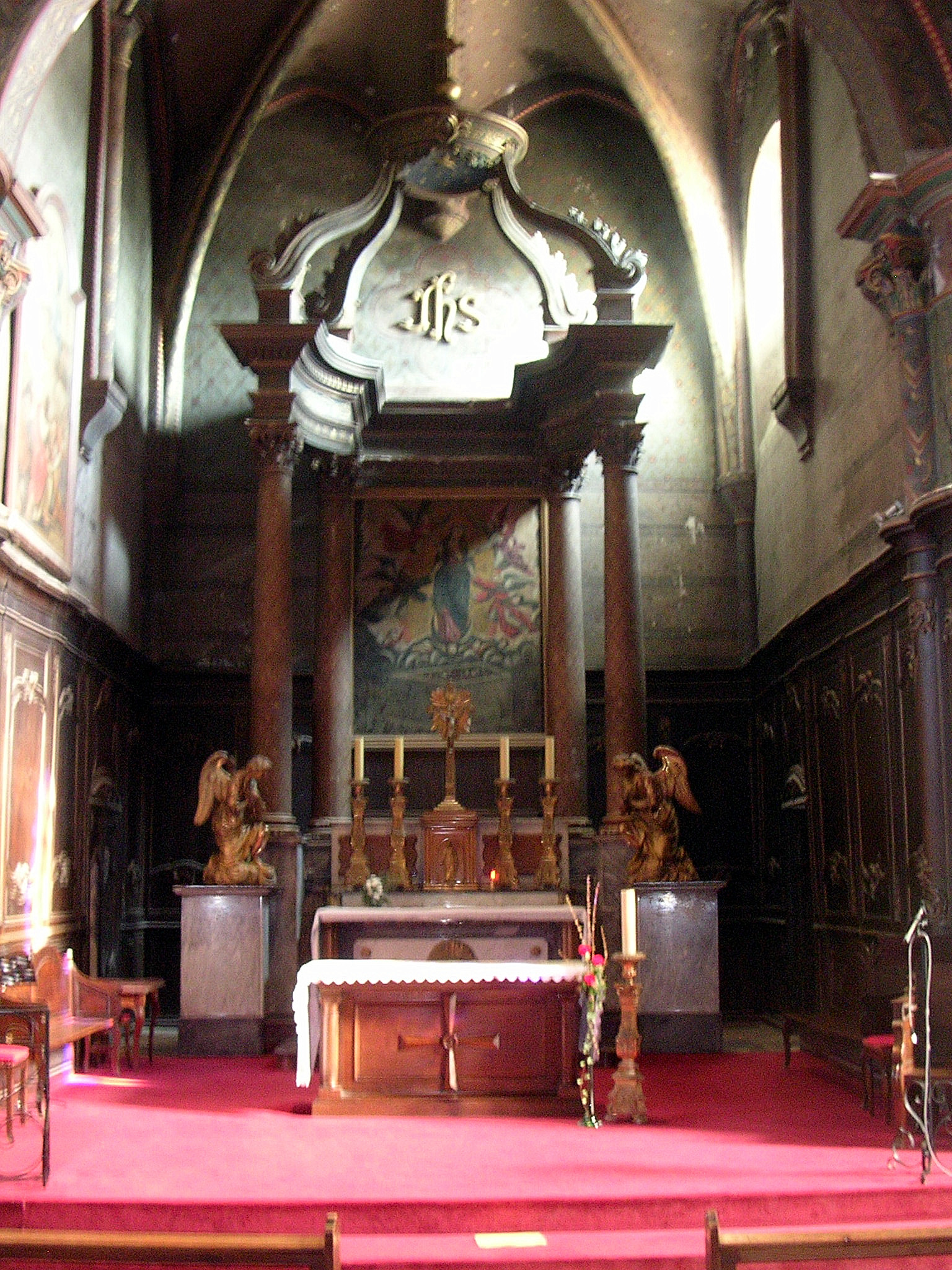 Choeur de l'église Notre-Dame de l'Assomption, à Roquefort, dans le département français des Landes